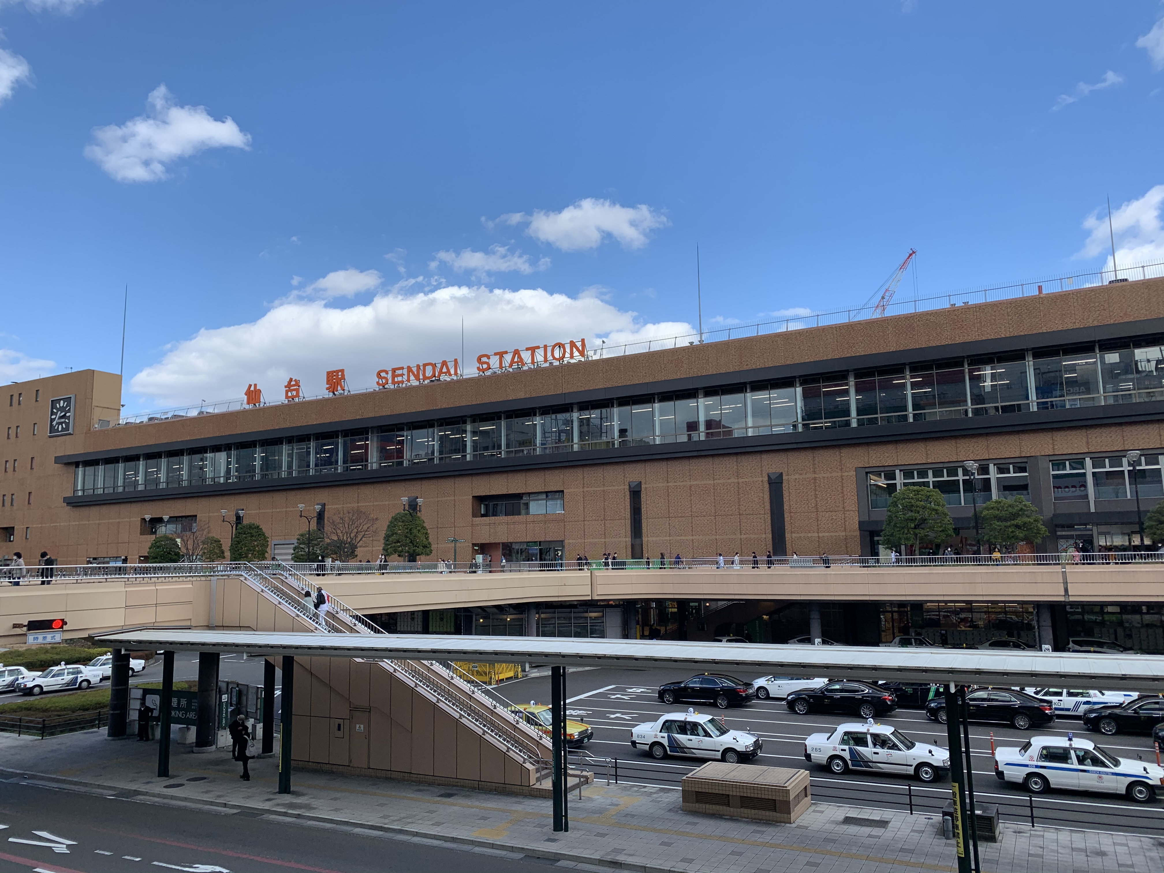 2020年3月12日に撮影した仙台駅西口駅舎